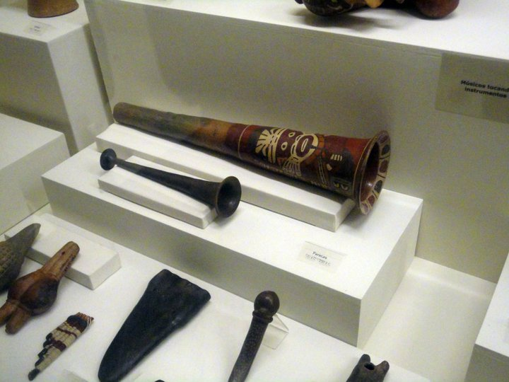 Corneta de la cultura Nazca (siglo I al VI